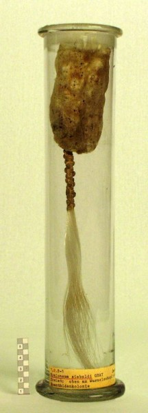 Especimen de Hyalonema sp.